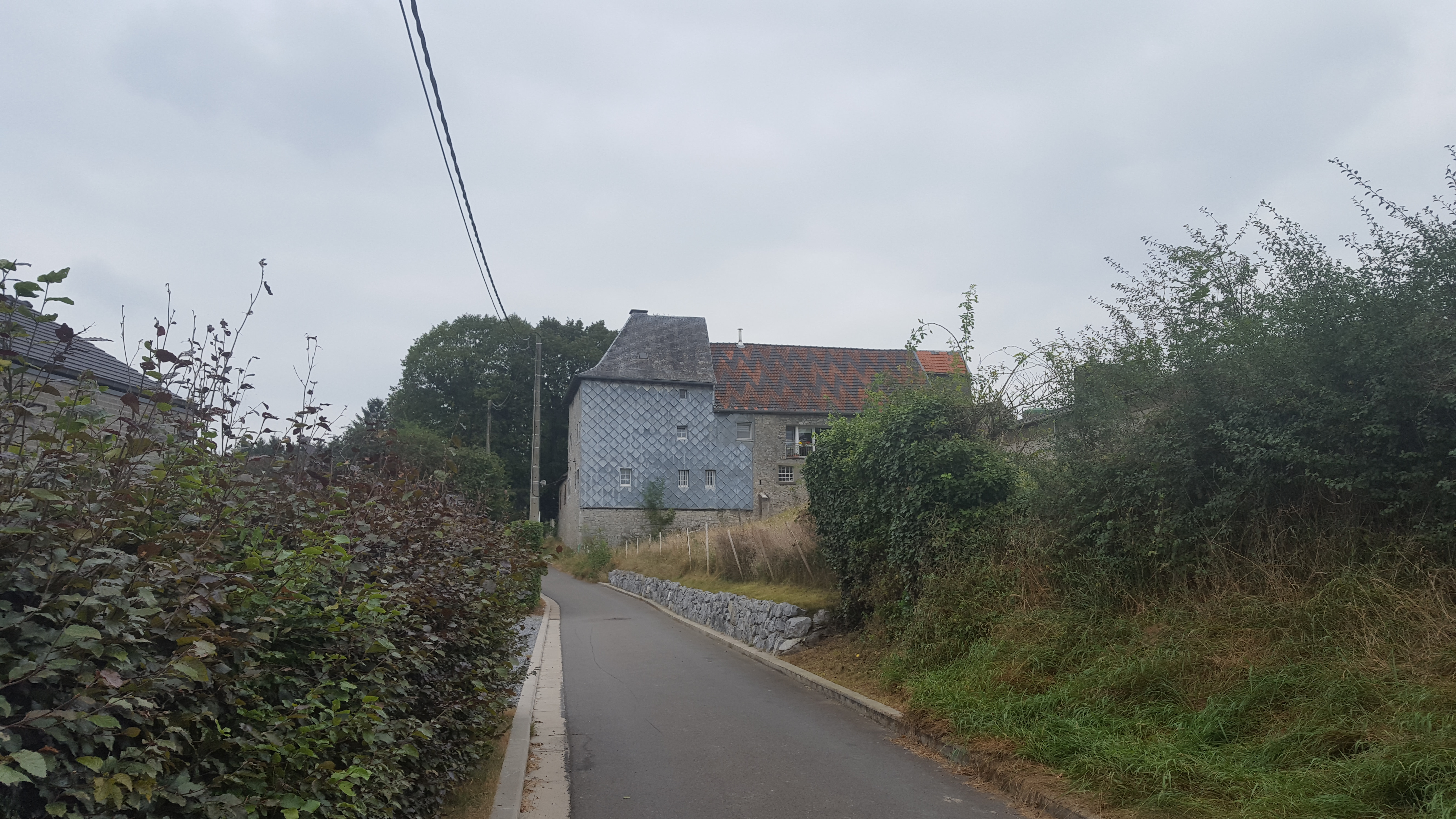 la tour Nereth, Baelen, Belgique